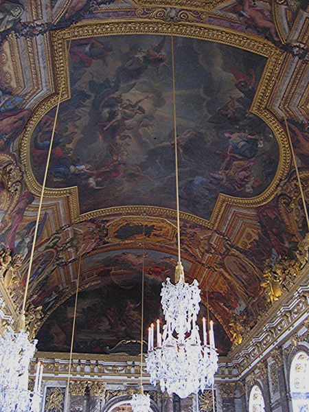 Galerie des Glaces, château de Versailles, photographie personnelle, prise par l'Utilisateur Urban, septembre 2004, GFDL Urban Septembre 2004 Catégorie:Image du château de Versailles